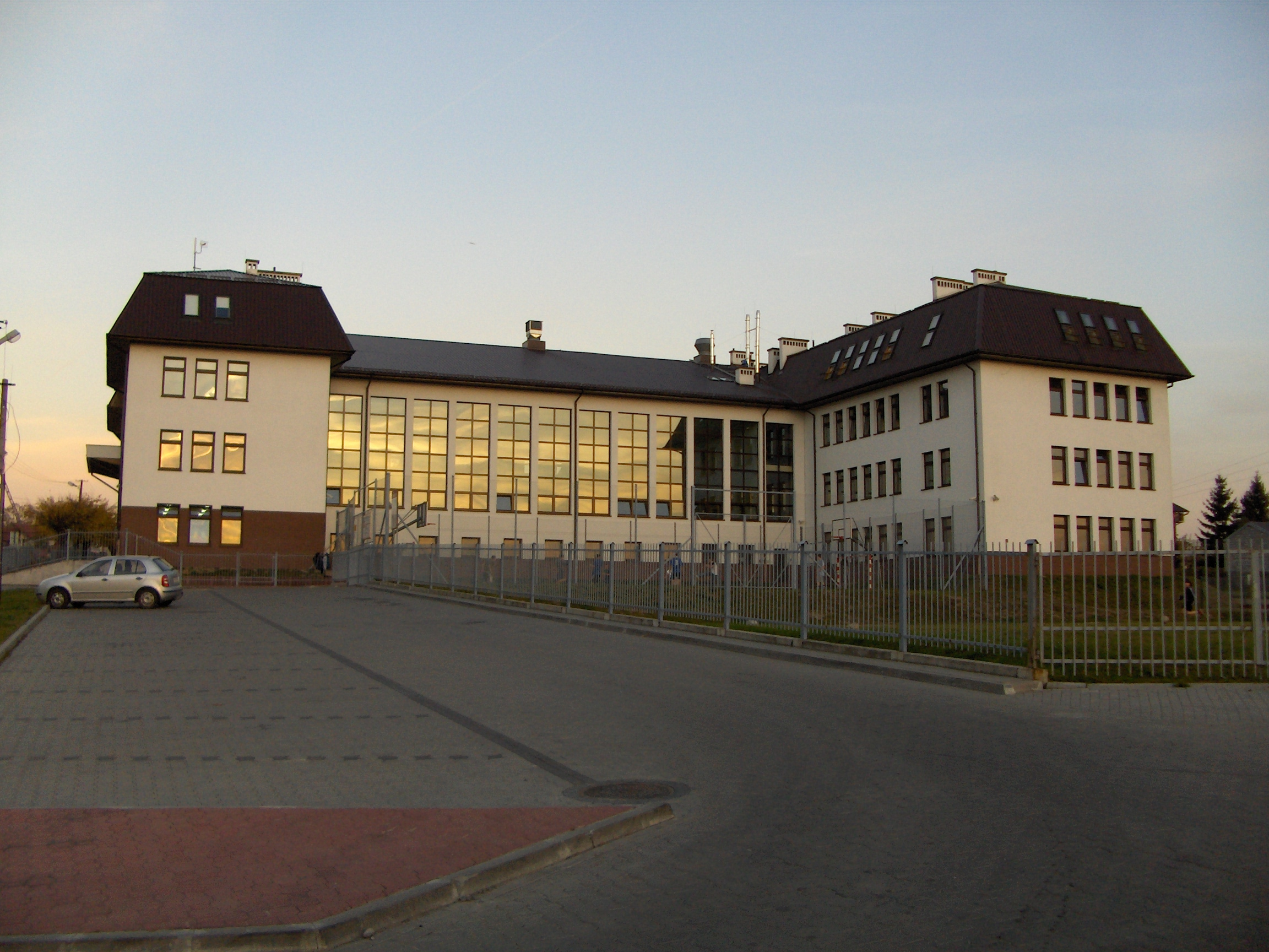 Szkoła podstawowa im.Stanisława wyspiańskiego w Bibicach , Województo Małopolskie.